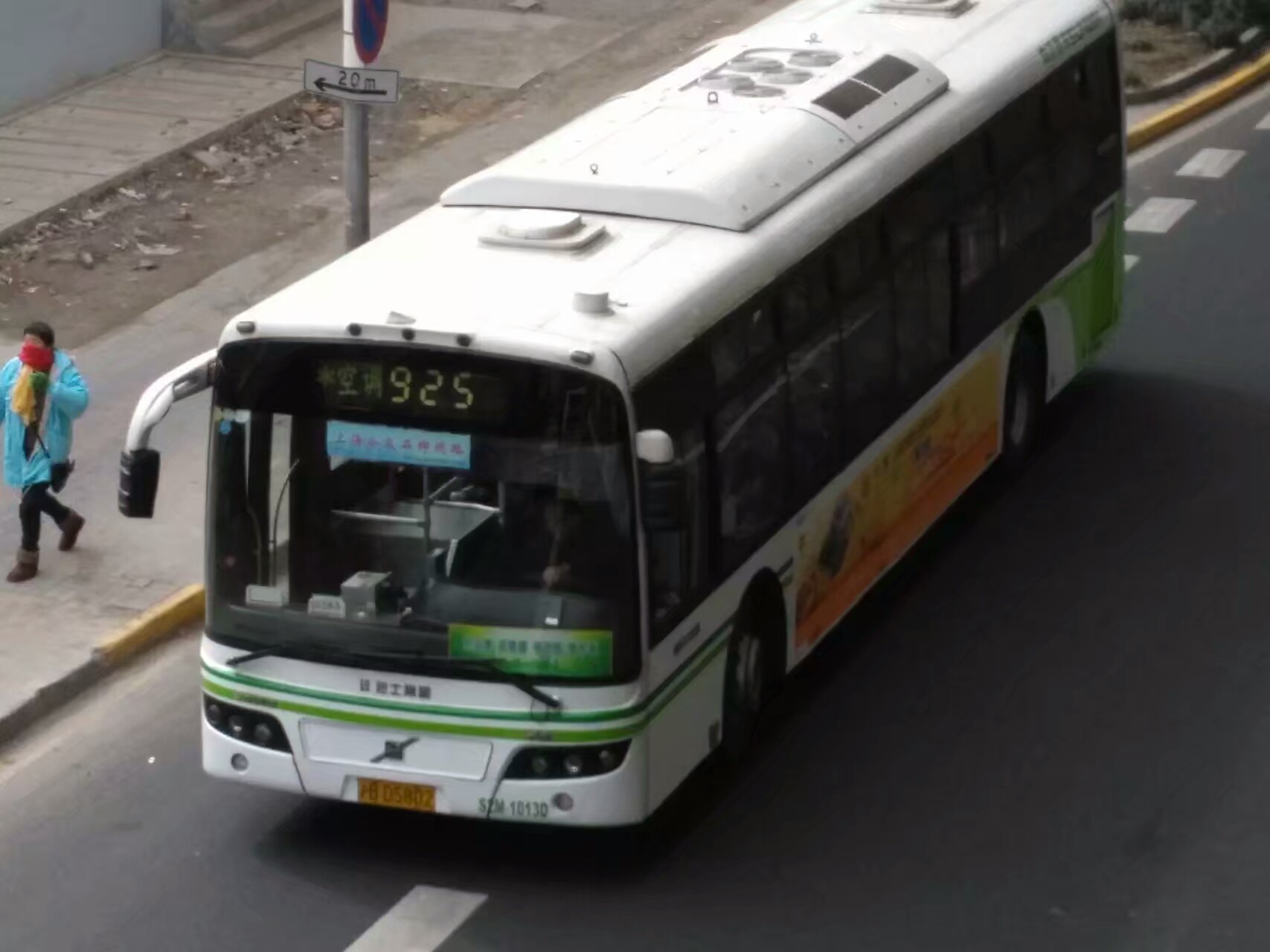 上海公交925路